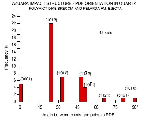 Azuara impact structure - PDF orientation in quartz